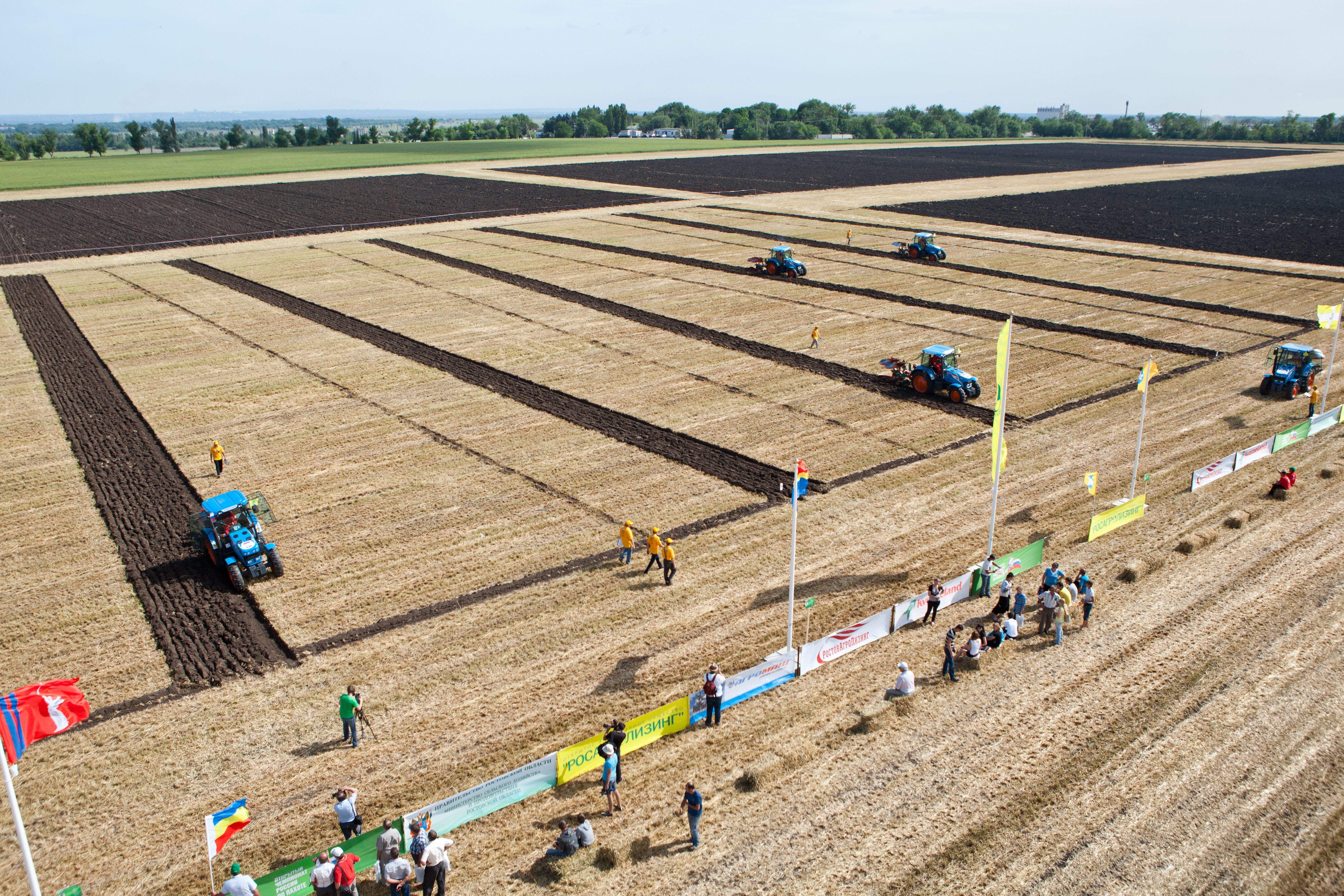 Чемпионат РФ по Пахоте 2013